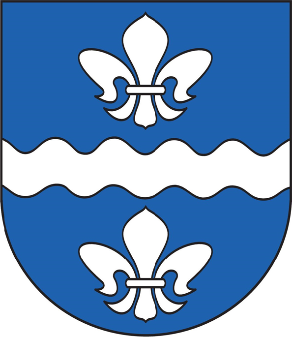 Herb gminy Andrespol